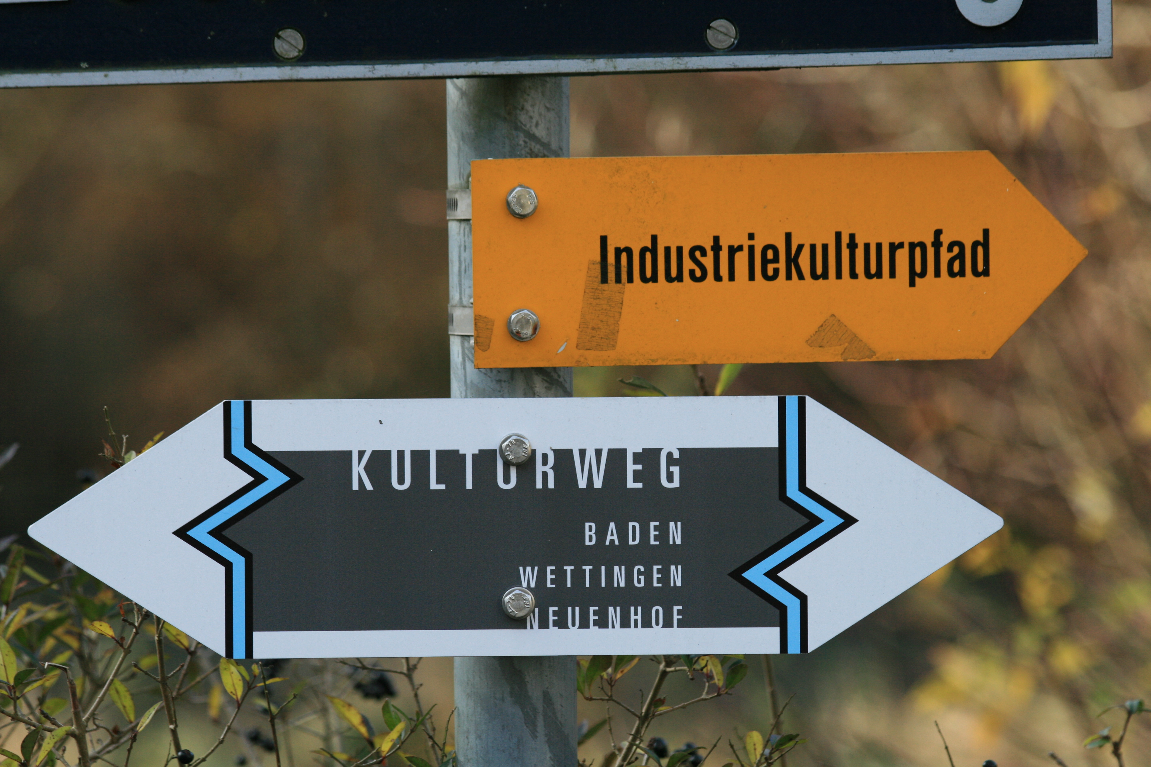 Wegweiser "Industriekultur" und "Kulturweg Baden Wettingen Neuenhof"